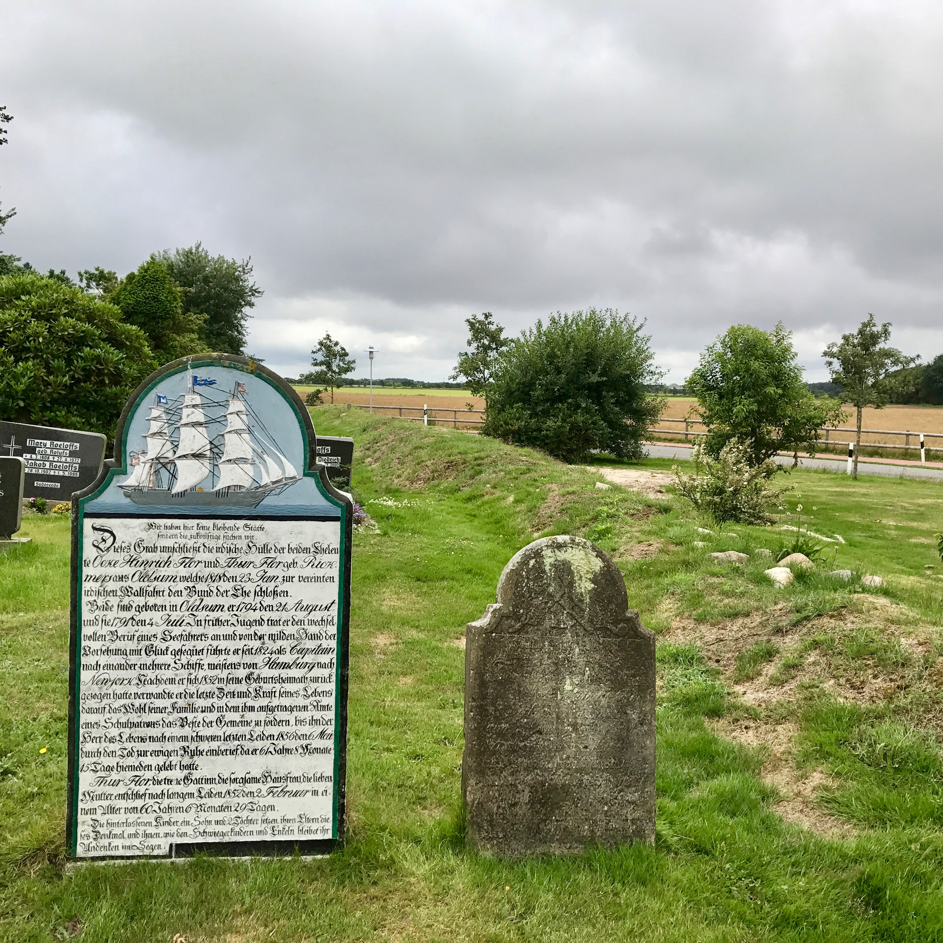 Grabsteine auf dem Friedhof Süderende (Föhr)